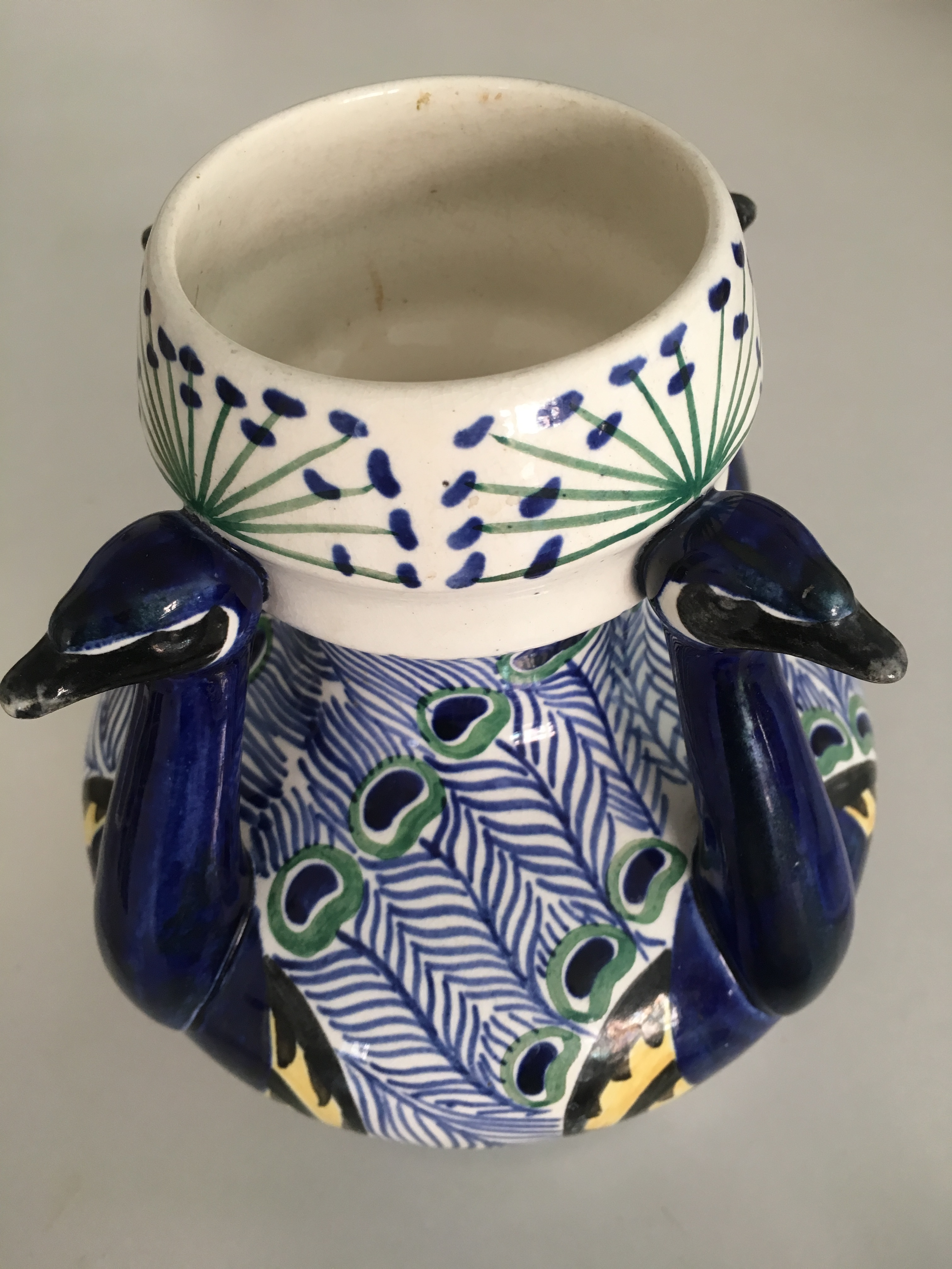 Påfuglevase udført af Harald Slott-Møller (1864-1937) for Aluminia mellem 1902 og 1906.